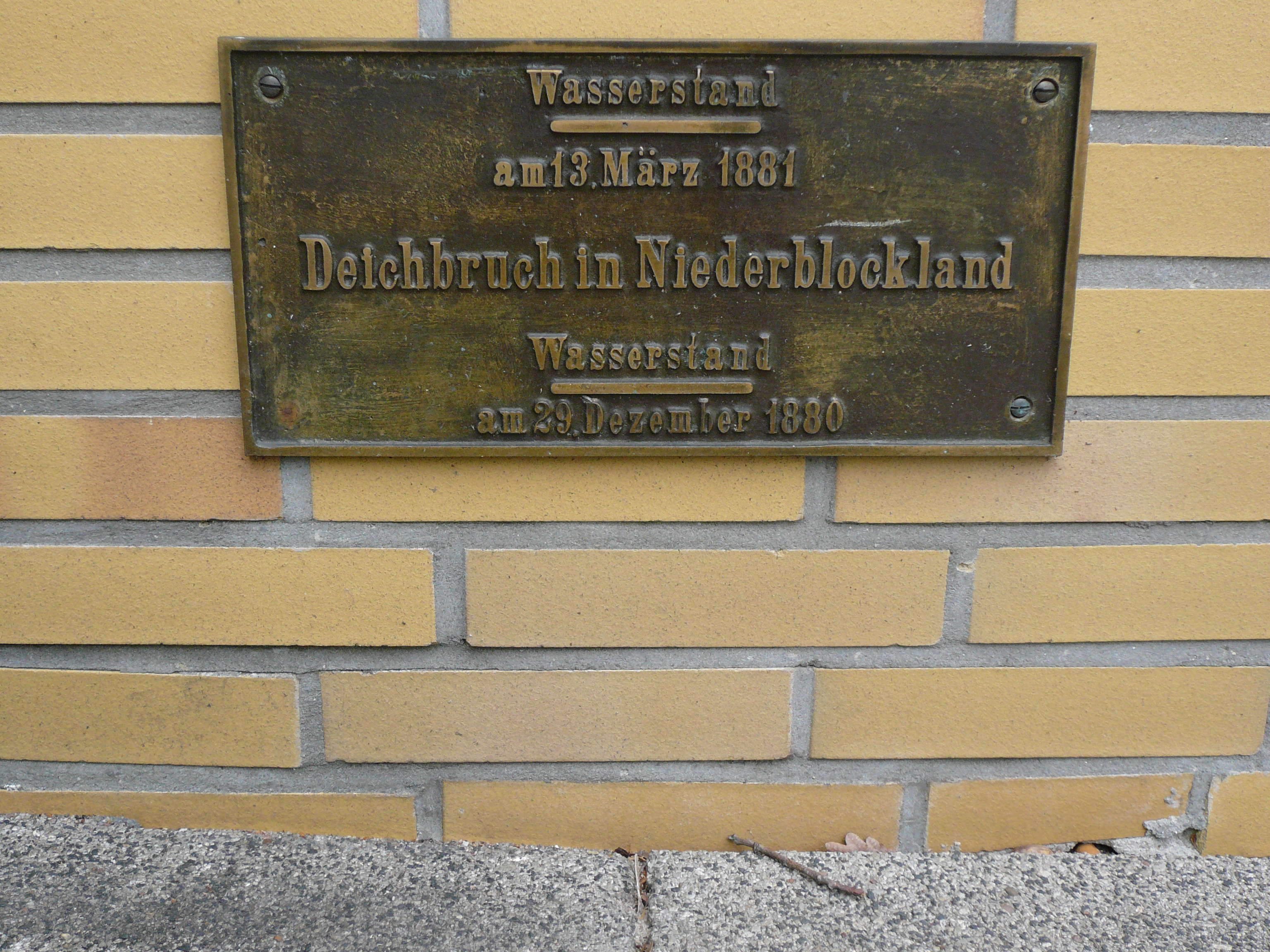 Eine Plakette in Bremen, die die Höhen von zwei Hochwassern aus dem 19. Jahrhundert markiert